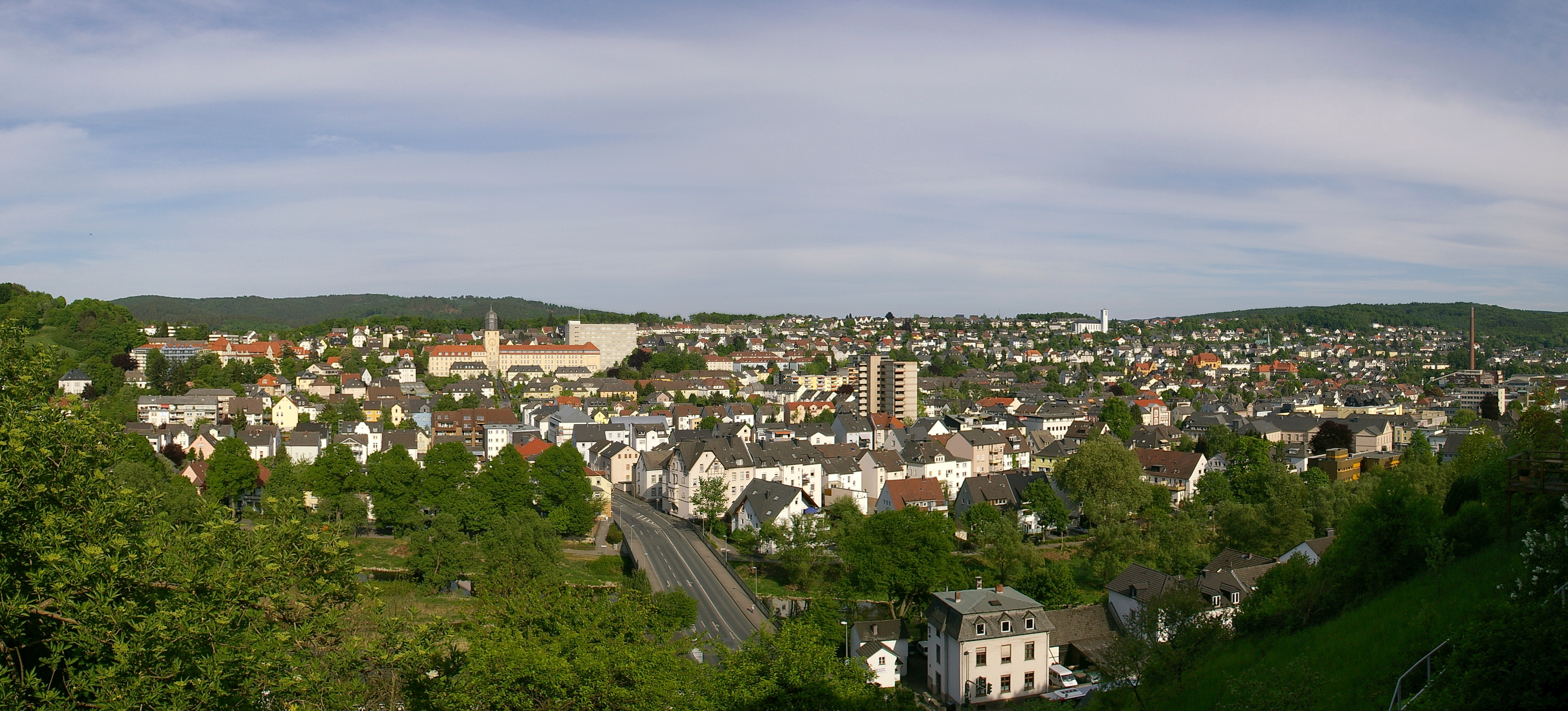 Blick von der Altstadt nach Osten über Arnsberg, Nordrhein-Westfalen